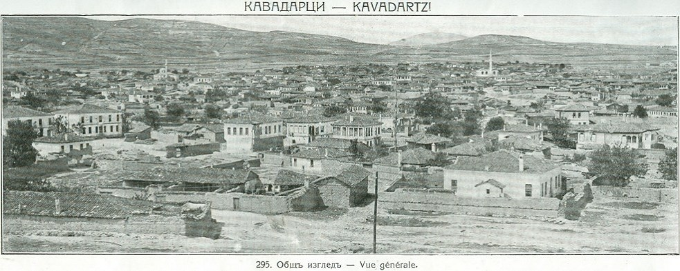 Kavadartsi